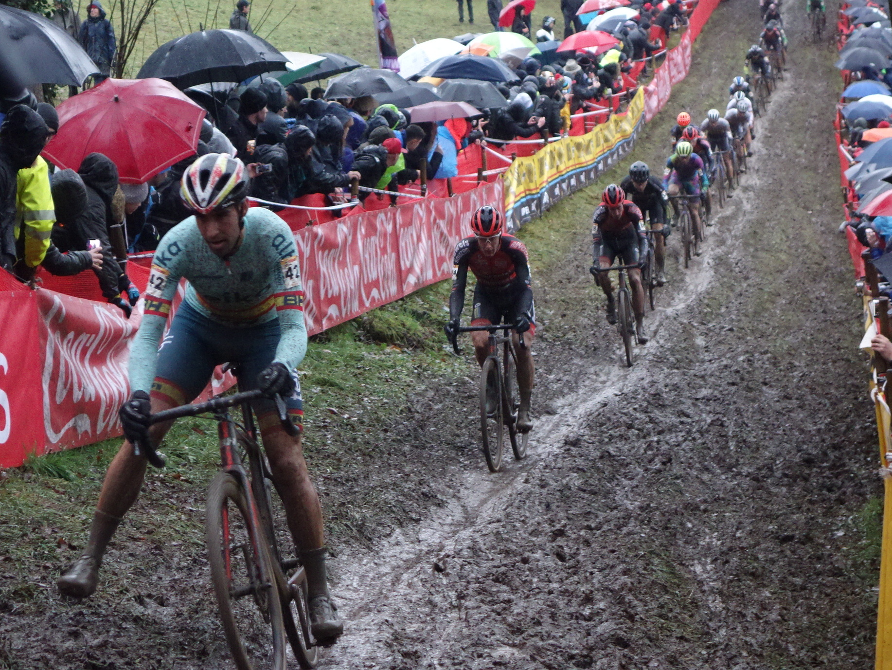 Wereldbeker veldrijden op de Citadel van Namen op zondag 22 december 2019